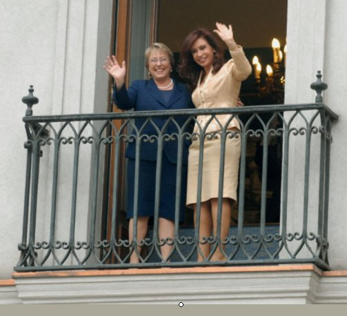 Michelle Bachelet y Cristina Fernández de Kirchner, presidents of Chile and Argentina.